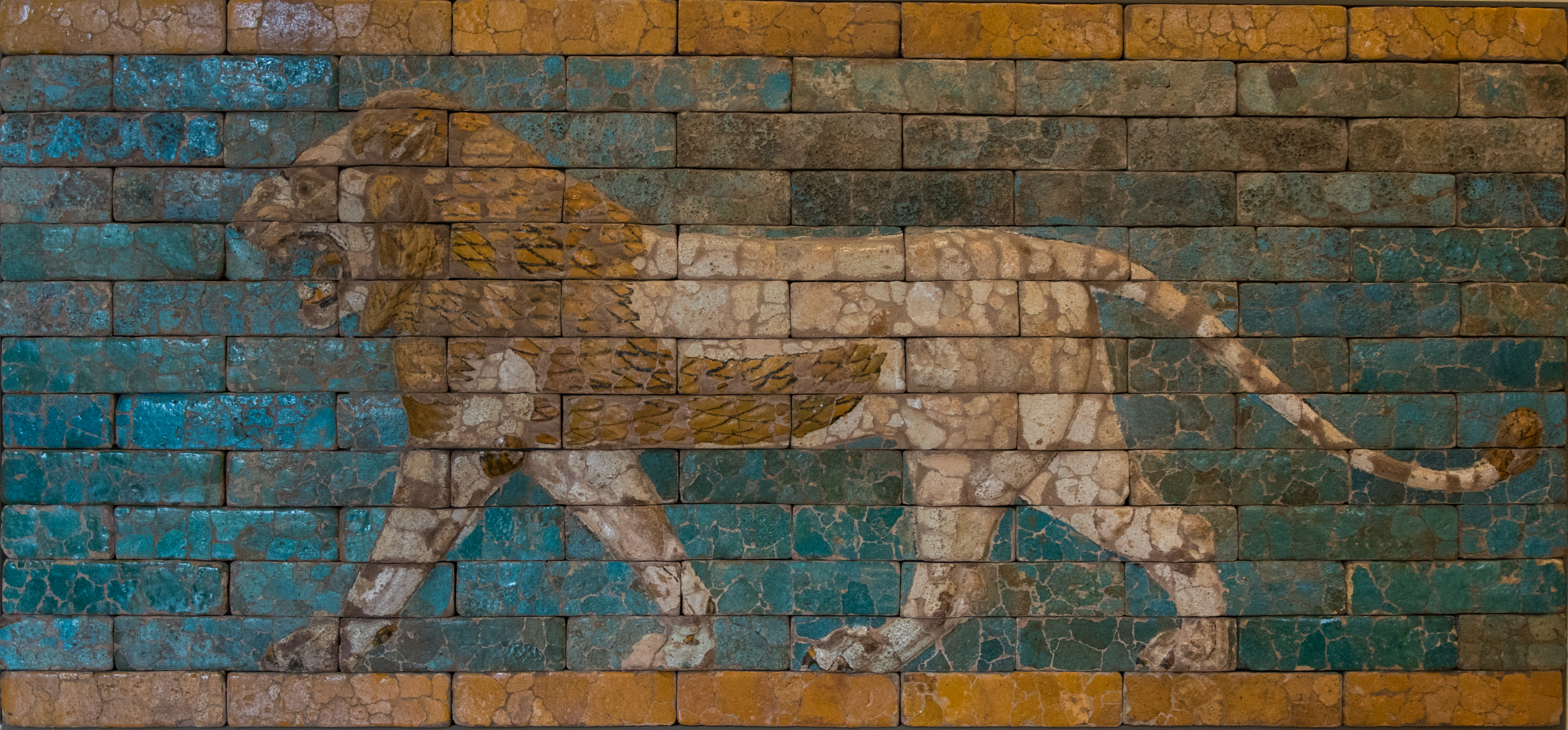 Panneau de briques : lion passant - Époque néo-babylonienne, règne de Nabuchodonosor II (604 - 562 avant J.-C.) - Babylone (Iraq) Ce panneau appartenait au décor de la Voie Processionnelle de Babylone qui conduisait du temple de Marduk au temple de l'Akitu, en passant par la Porte d'Ishtar. Le lion est l'animal attribut de cette déesse. Le cortège des prêtres empruntait cette voie lors des cérémonies de la fête du Nouvel An qui se déroulait à l'équinoxe de printemps. La Voie Processionnelle, mise au jour au cours des fouilles allemandes de Babylone, est partiellement reconstituée au Vorderasiatisches Museum de Berlin.